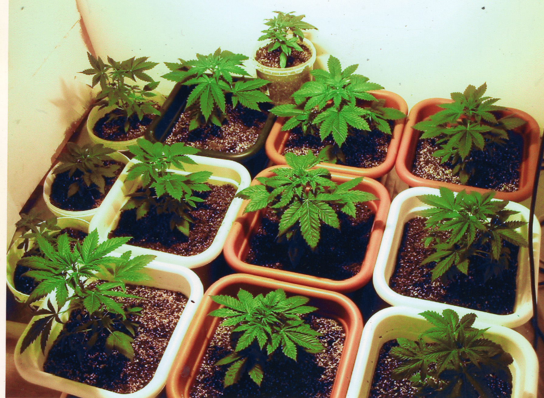 marihuana plantation